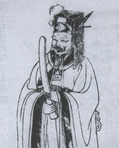 Portrait supposé de Su Song